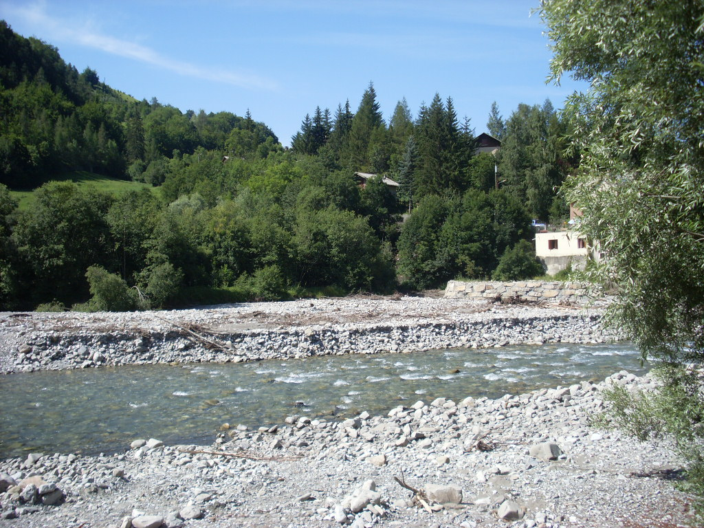 Le Drac à Pont-du-Fossé